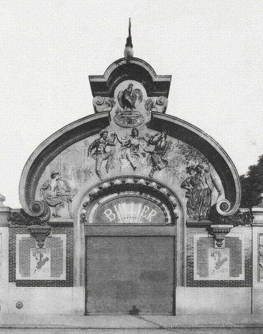 L'entrée principale du Bal Bullier au quartier latin à Paris.